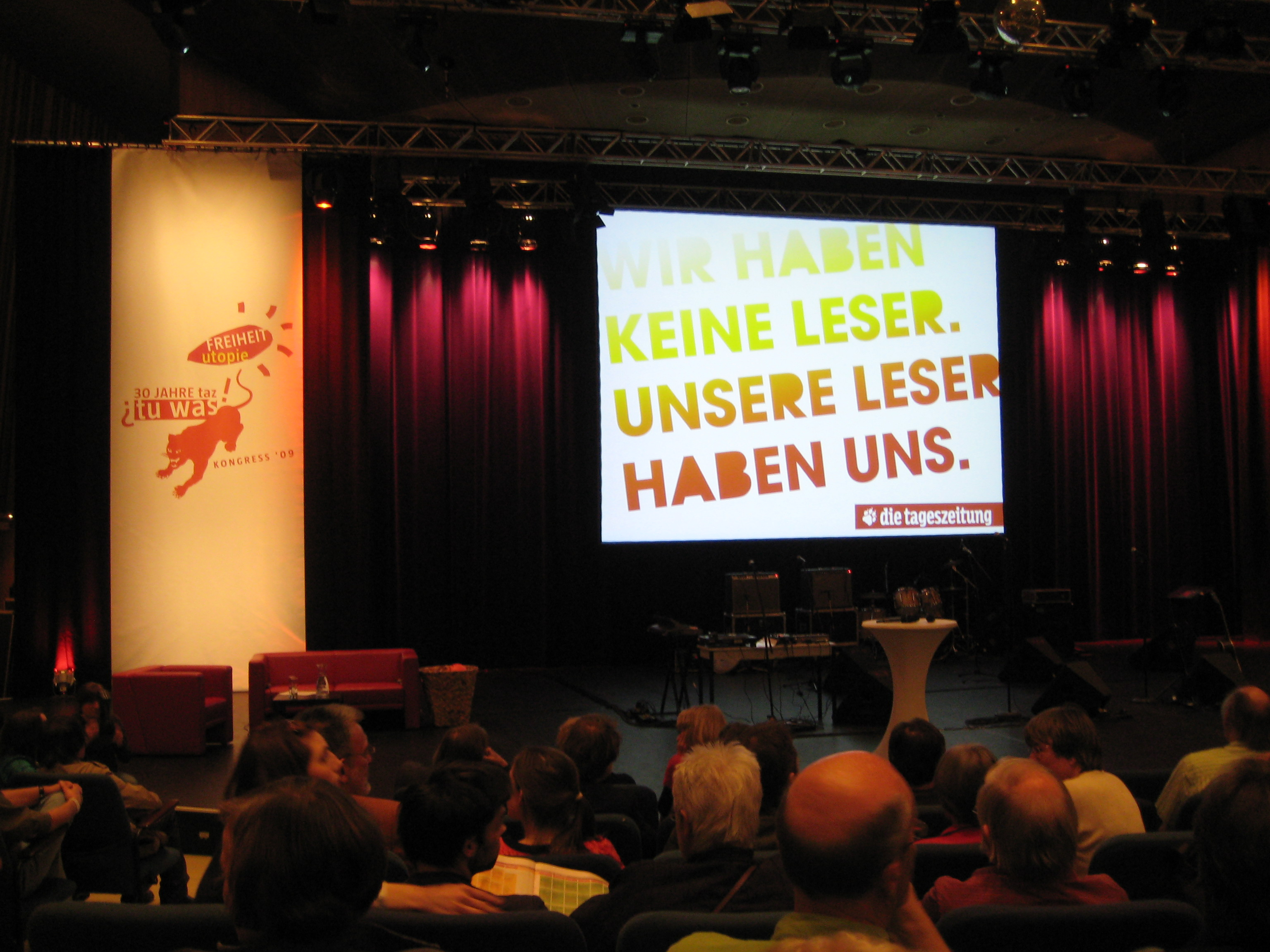 während des 1. taz lab 2009 (17. bis 19. April 2009) – "¿Tu was! Freiheit & Utopie“, Veranstaltungsort: Haus der Kulturen der Welt (HKW), Berlin